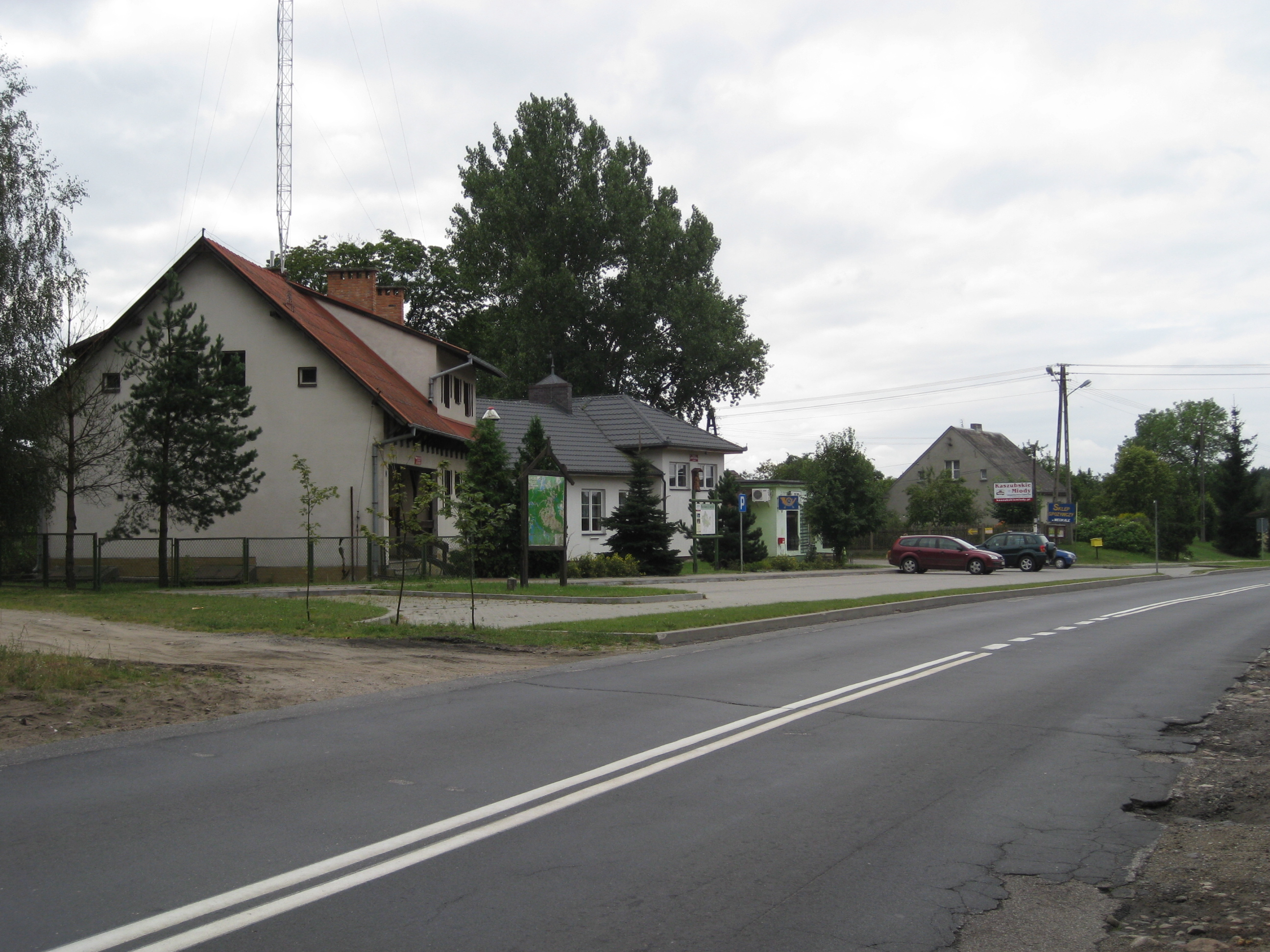 ul. Bruska, od lewej filia Biblioteki Publicznej z Brus, remiza OSP, sklep GS Brusy z agencją pocztową Męcikał, gmina Brusy, powiat chojnicki, województwo pomorskie, Polska